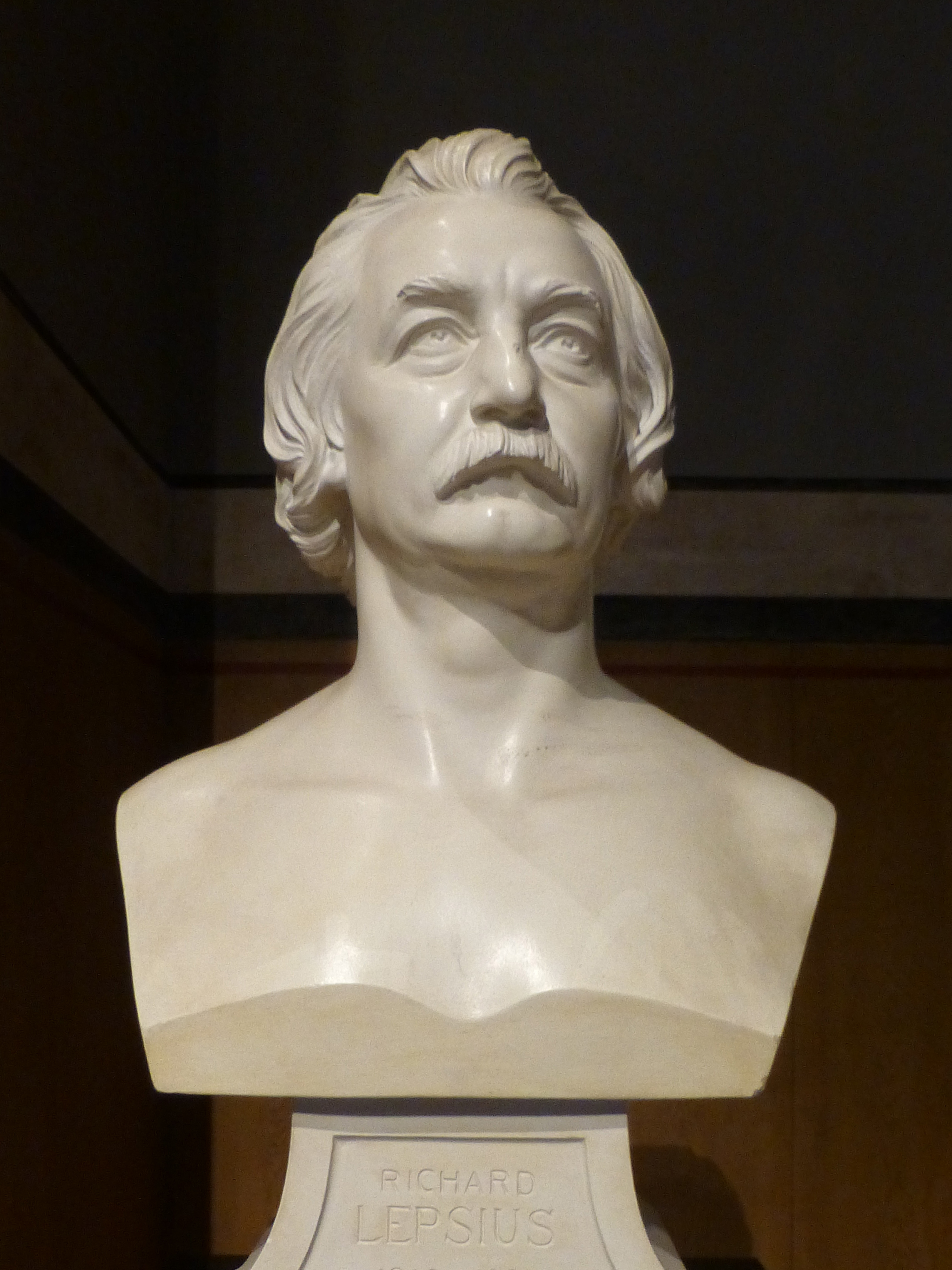 Berlin, Neues Museum : Karl Richard Lepsius. Um 1870 von Johann Friedrich Drake Gips, nach einem Marmororiginal.